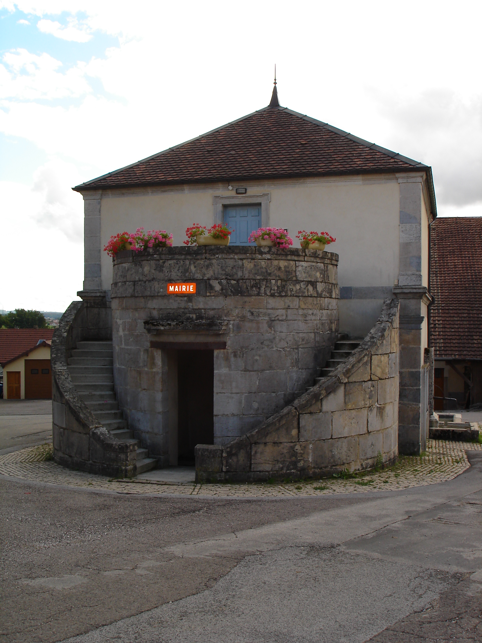 Gennes (Doubs) : mairie-lavoir .